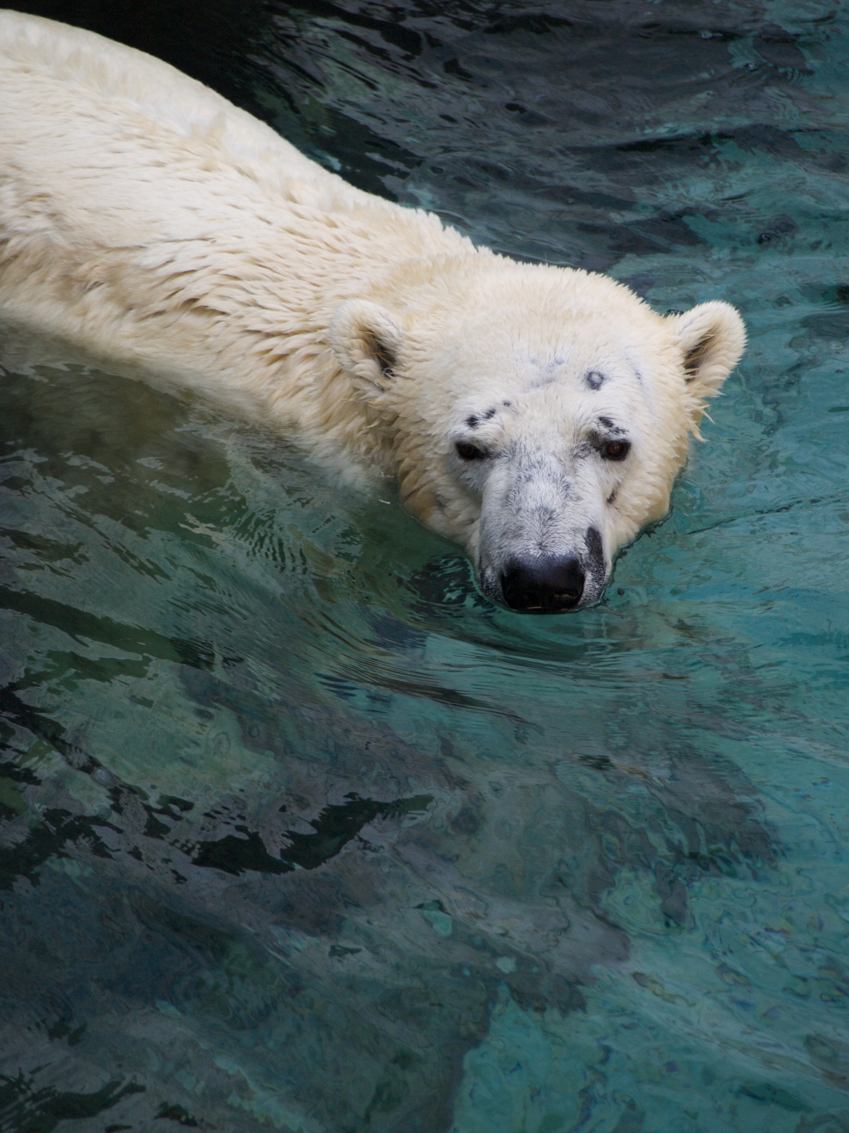 ホッキョクグマ/polar bear